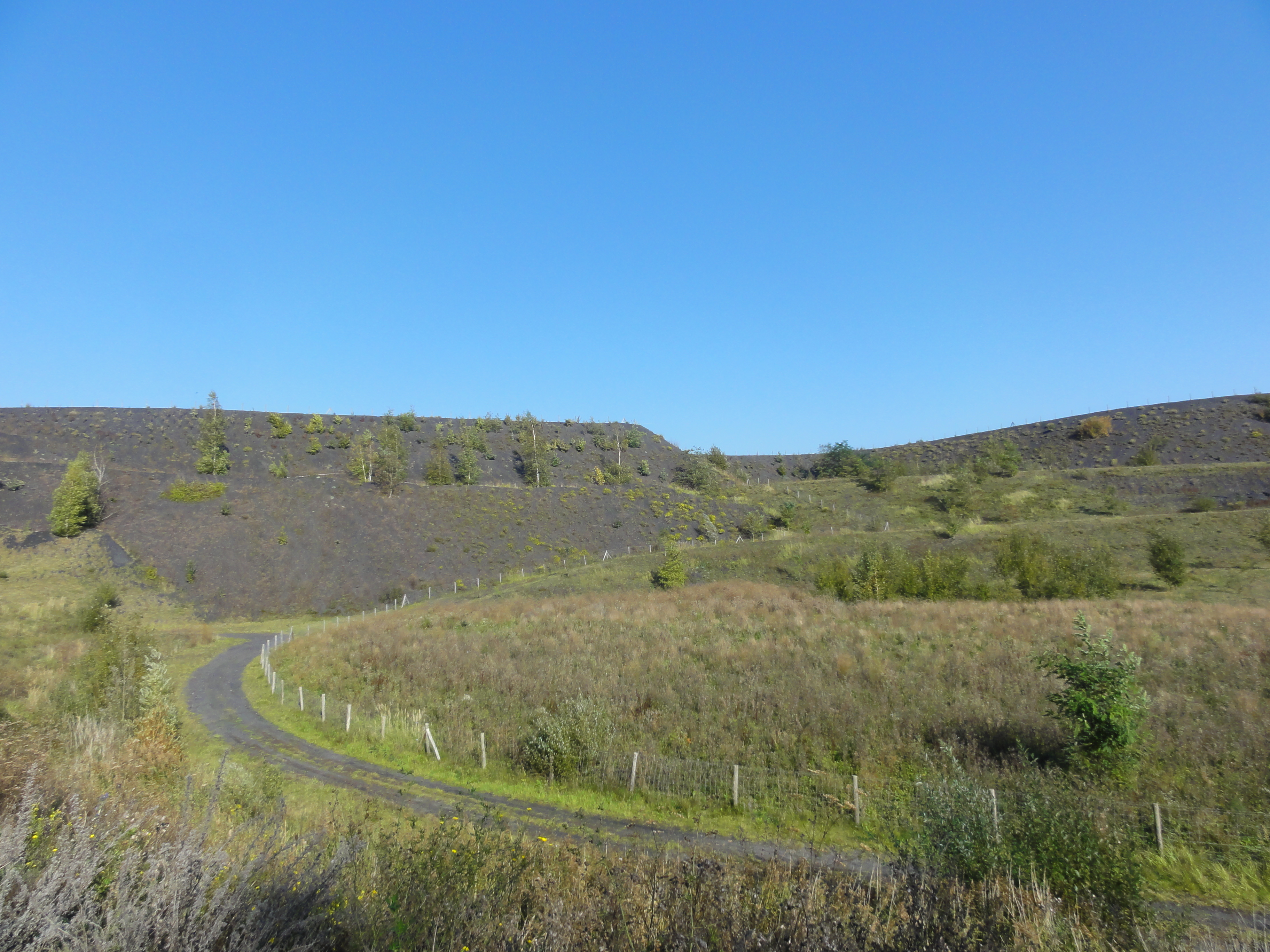 Terril n° 115 dit 2 du téléphérique, Fosse n° 2 de la Compagnie des mines d'Ostricourt, Libercourt, Pas-de-Calais, Nord-Pas-de-Calais, France.